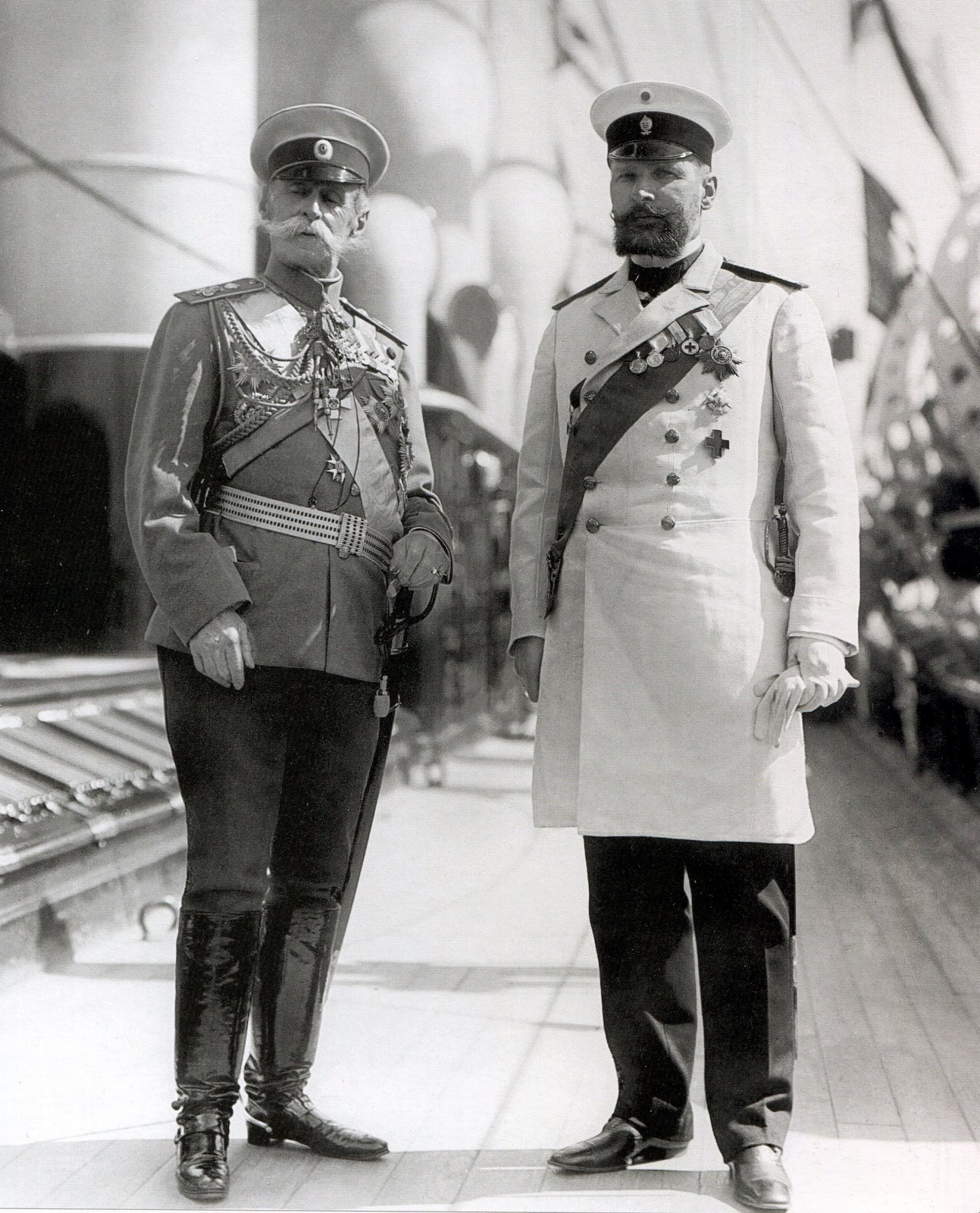 Министр Императорского двора барон В.Б.Фредерикс и председатель Совета министров П.А.Столыпин. Финляндия, 1910.